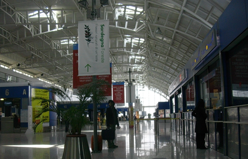 Area Check in Aeroporto di Cagliari, foto personale